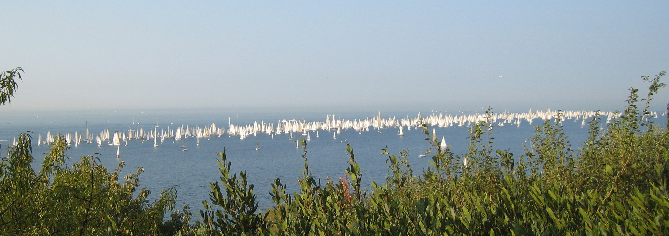 Trieste - Un parte della linea di partenza della regata velica Barcolana 2008. 12-10-2008